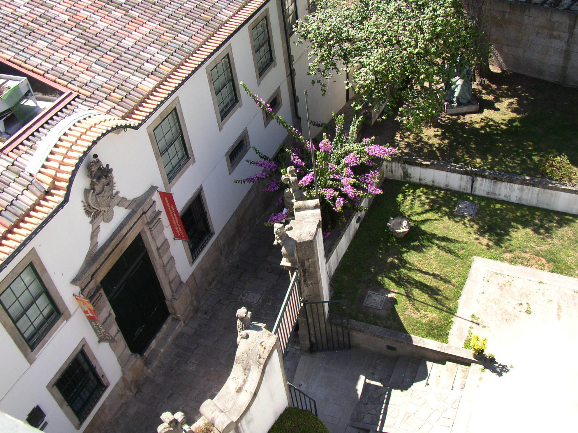 Casa do Dr. Domingos Barbosa ou Museu de Guerra Junqueiro This file was uploaded for Wiki Loves Monuments in Portugal with the unique identifier 74495.